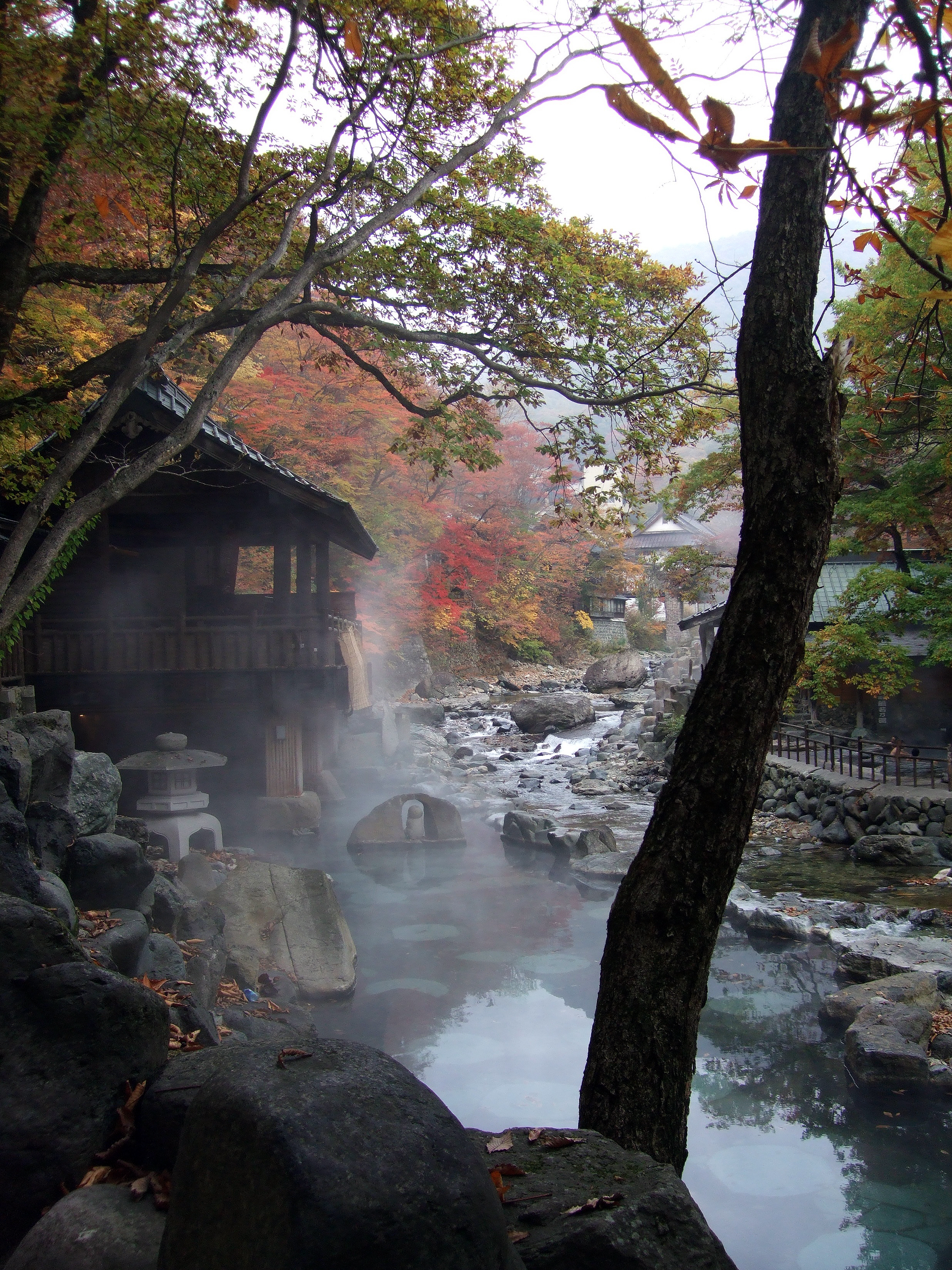 水上温泉郷・宝川温泉。 Fujifilm FinePix F200EXR